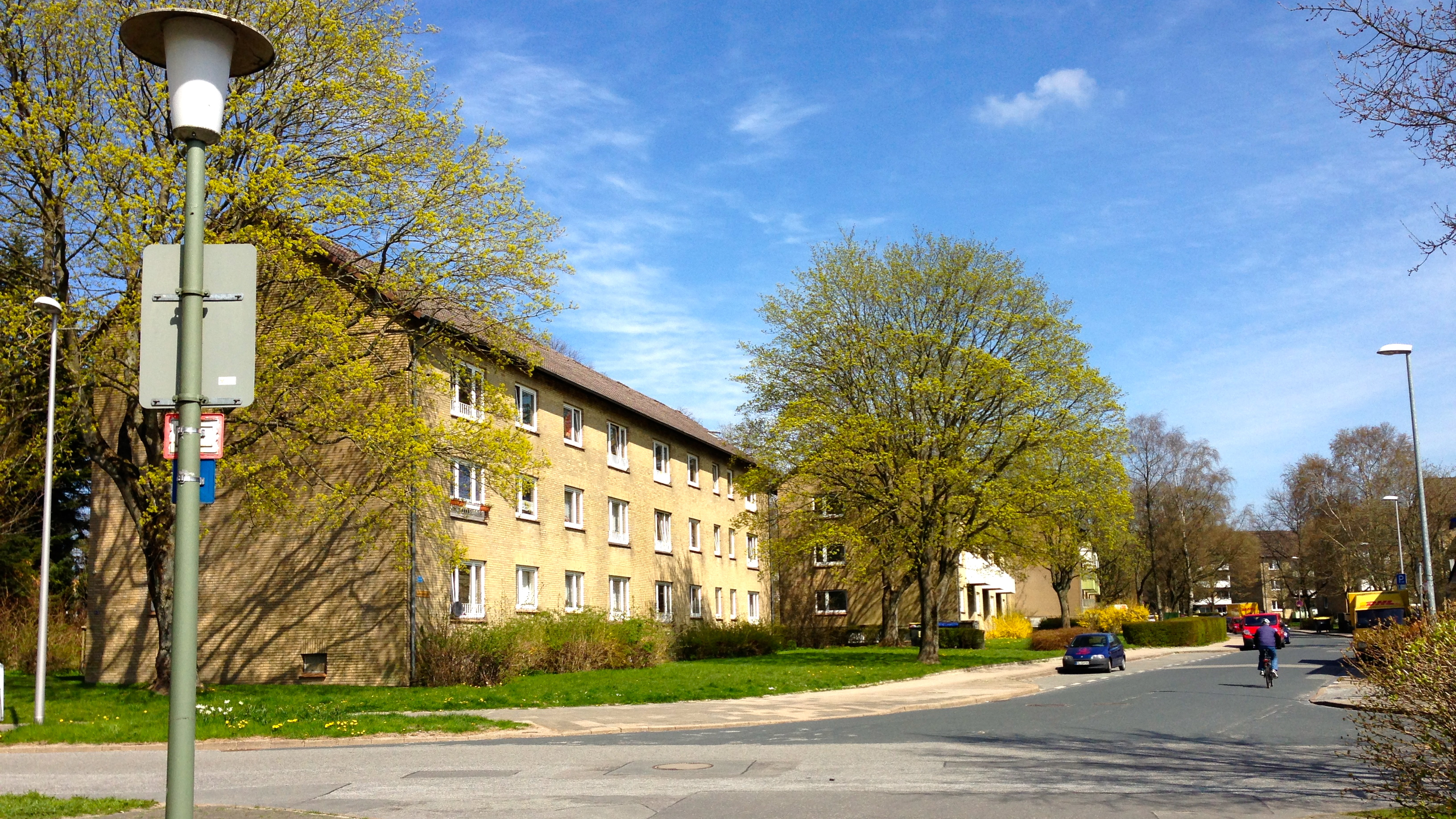 Frühlingsanfang in Flensburg Engelsby, mit Blick auf die Beethovenstraße.